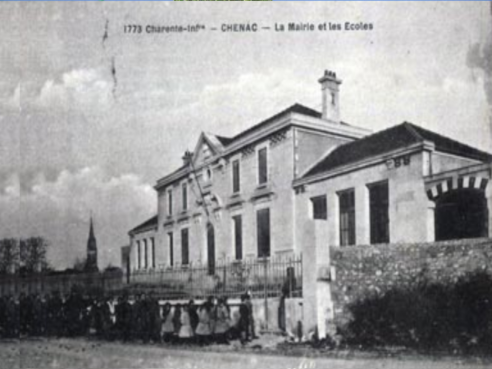 Carte postale ancienne de Chenac